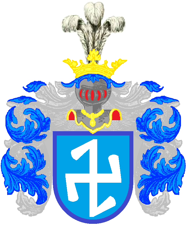 Герб "Єльці II"